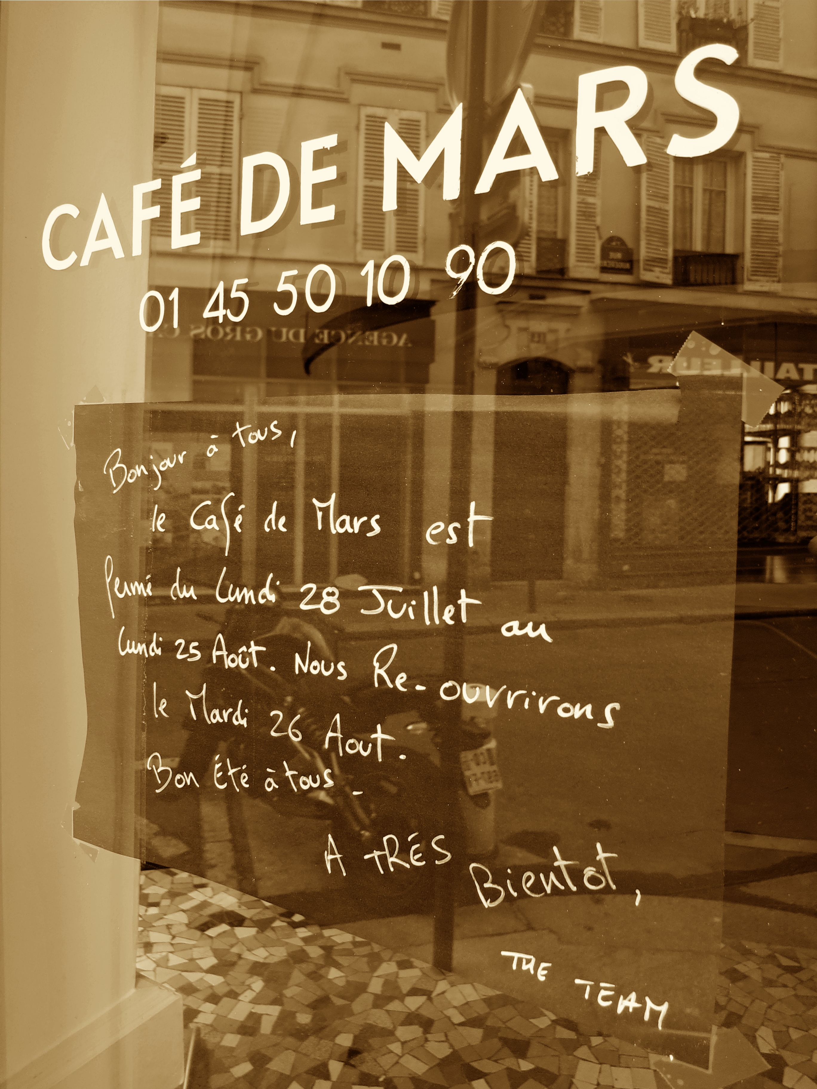 Paris - 11 rue Augereau - Congé estival du Café de Mars.